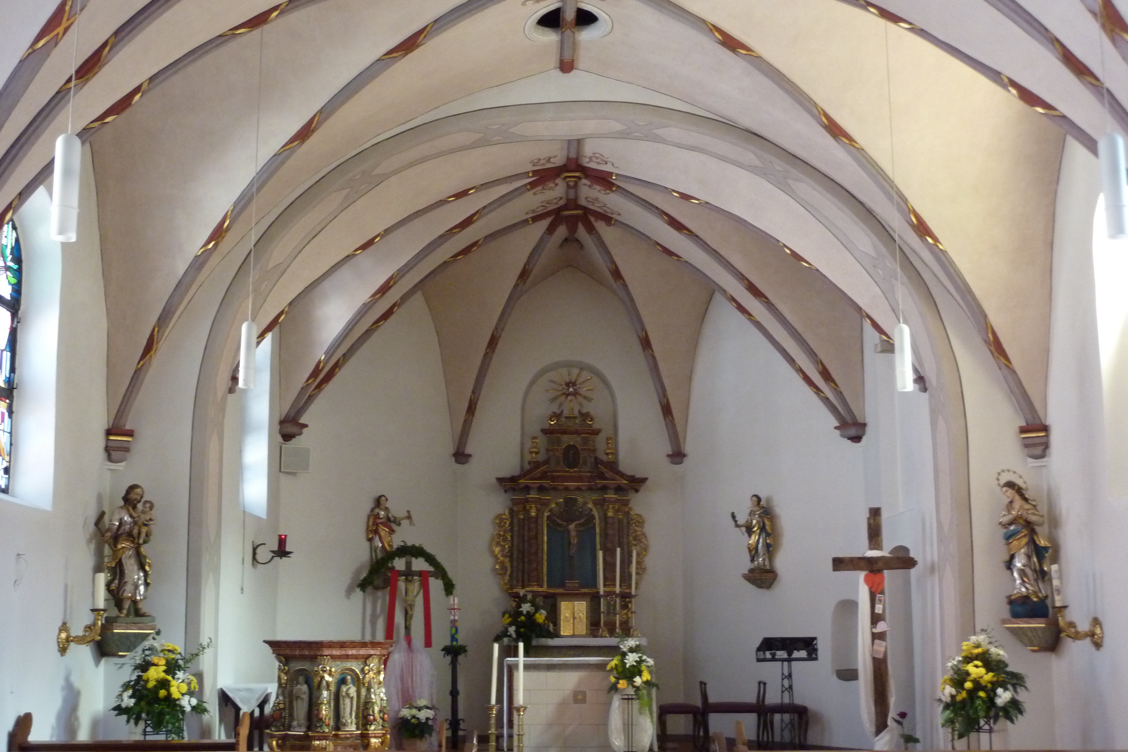 Pfarrkirche St. Luzia in Rech, Altar und Kanzel mit den vier Evangelsiten